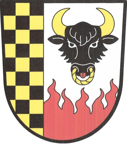 Žáravice znak